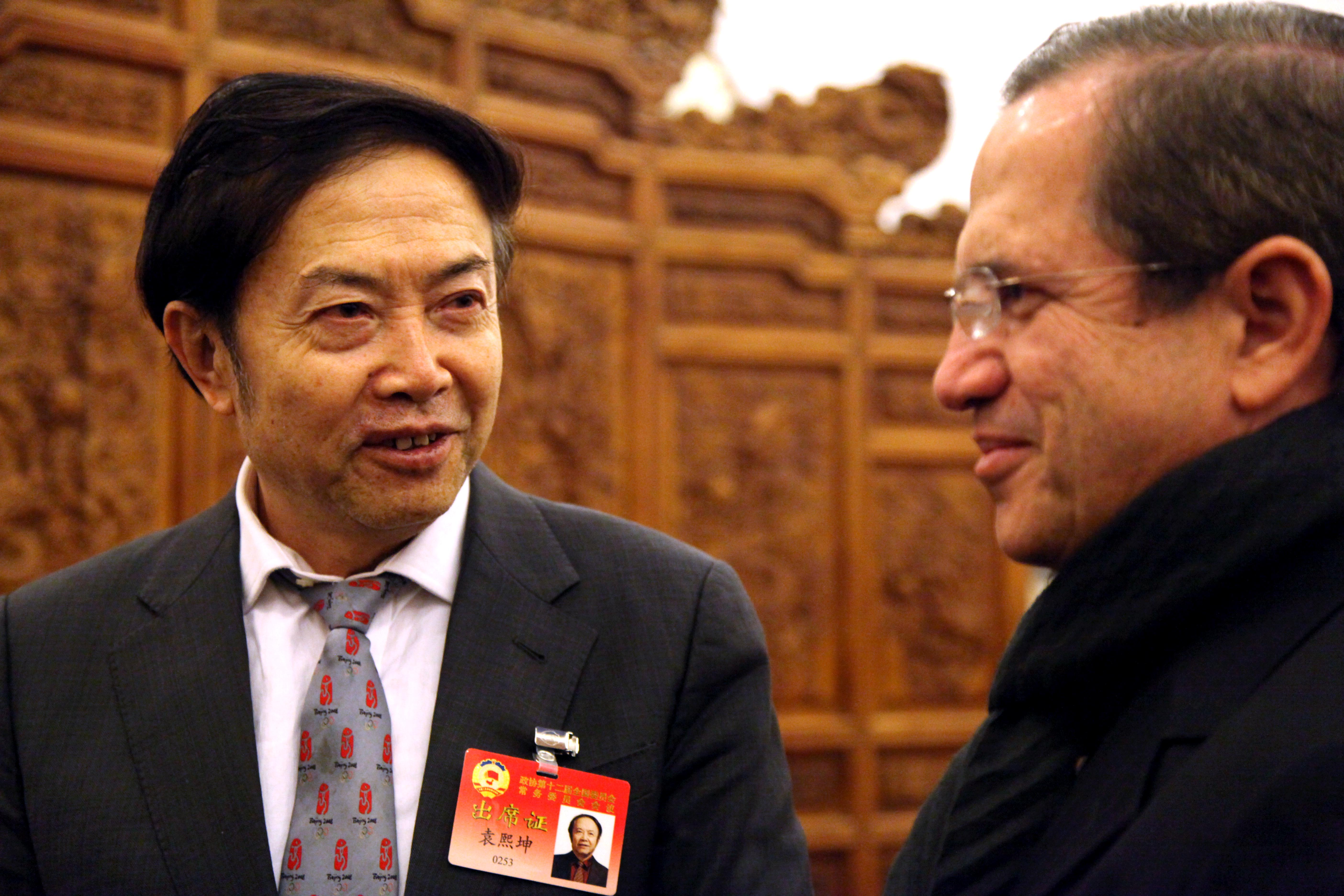 Beijing (China), 18 de noviembre 2013. En exteriores del Museo JINTAI, ubicado en el parque de Chaoyang, se realizó la colocación de la Ofrenda Floral al Busto de Eloy Alfaro por parte del artista chino Yuan Xikun, creador de dicho busto y fundador del Museo Jintai. Foto: Fernanda LeMarie - Cancillería del Ecuador.